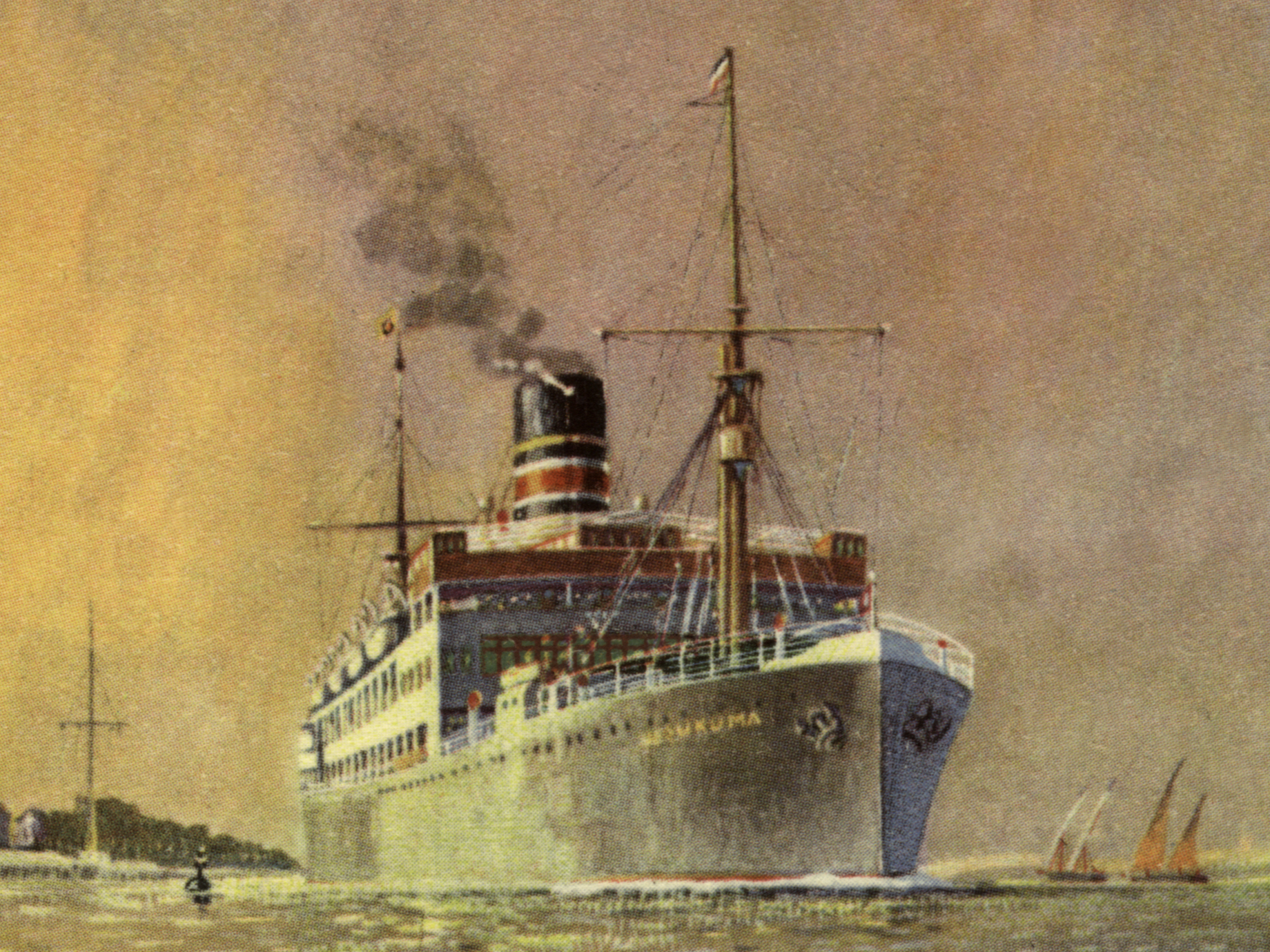 Linien-Passagierschiff Ussukuma 1921